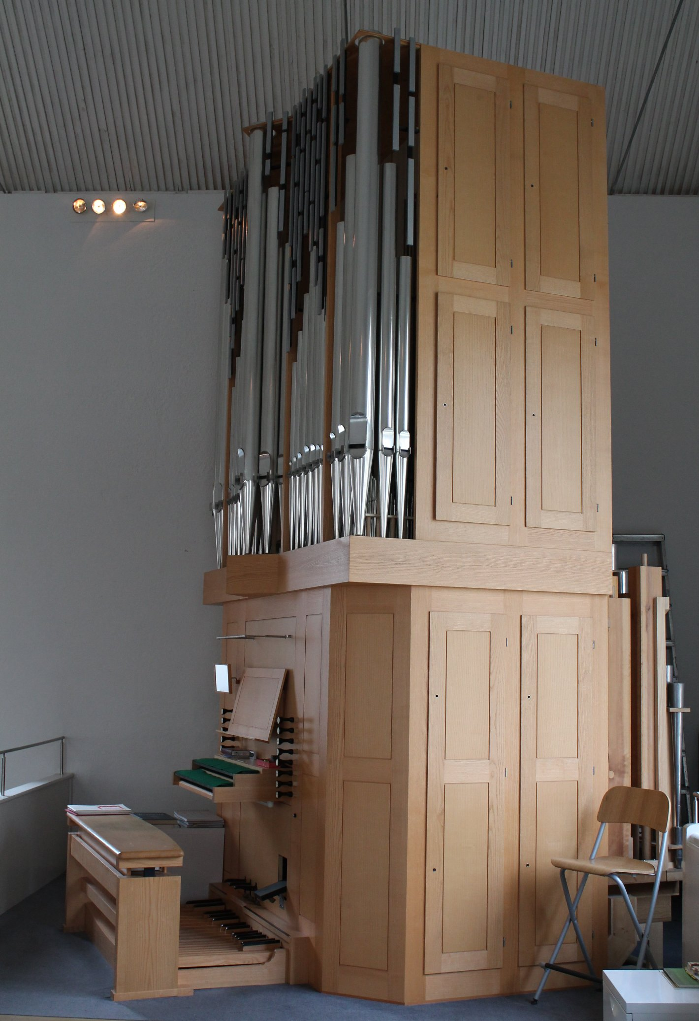 Orgel von St. Willibrord in München (2007, Gunnar Schmid, II/15)